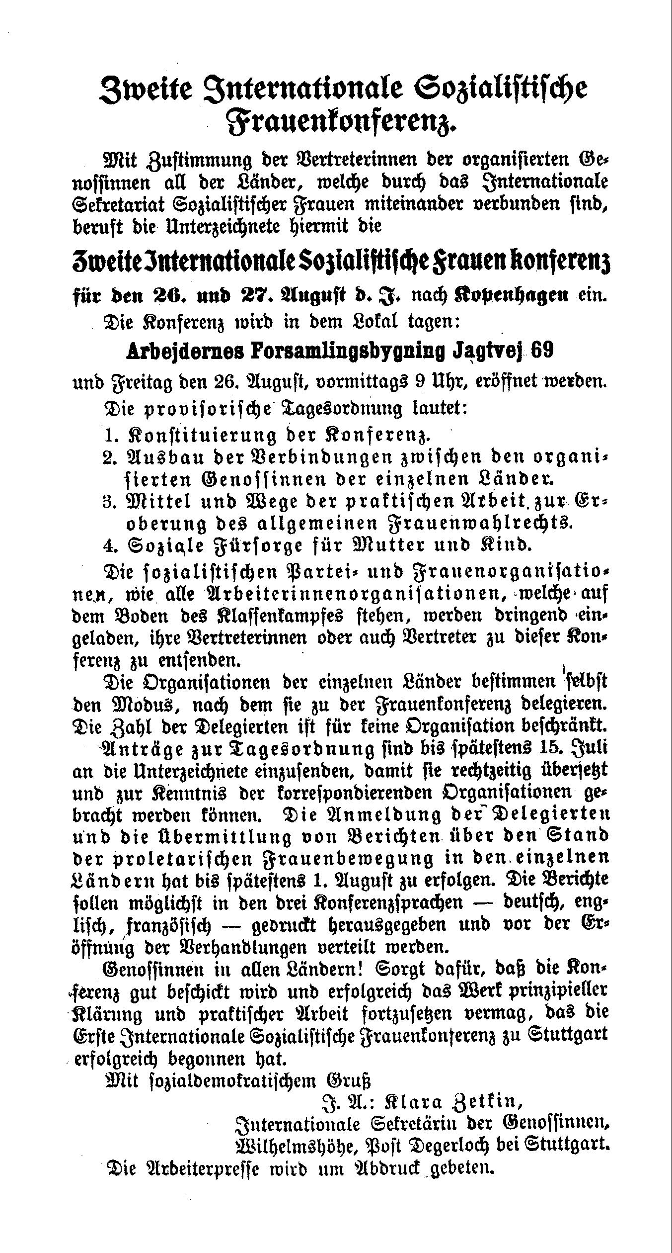 Aufruf von Clara Zetkin zur Internationalen Sozialistischen Frauenkonferenz in Kopenhagen 1910